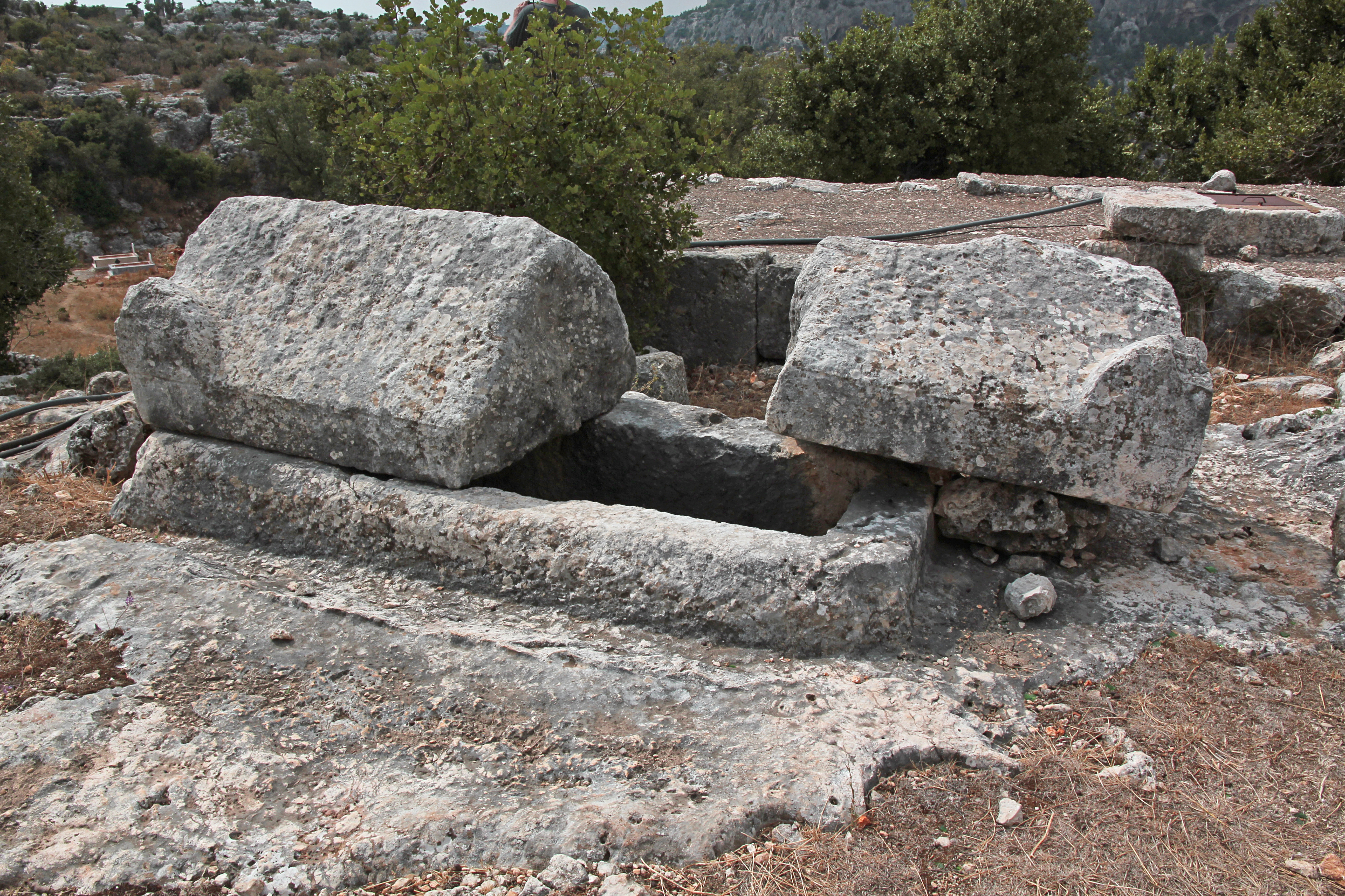 Tekkadın, römisch-byzantinische Siedlung in Kilikien bei Silifke, Südtürkei, Chamosorium mit Deckel